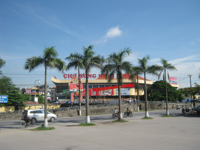 Đường Lê Đại Hành, thành phố Ninh Bình